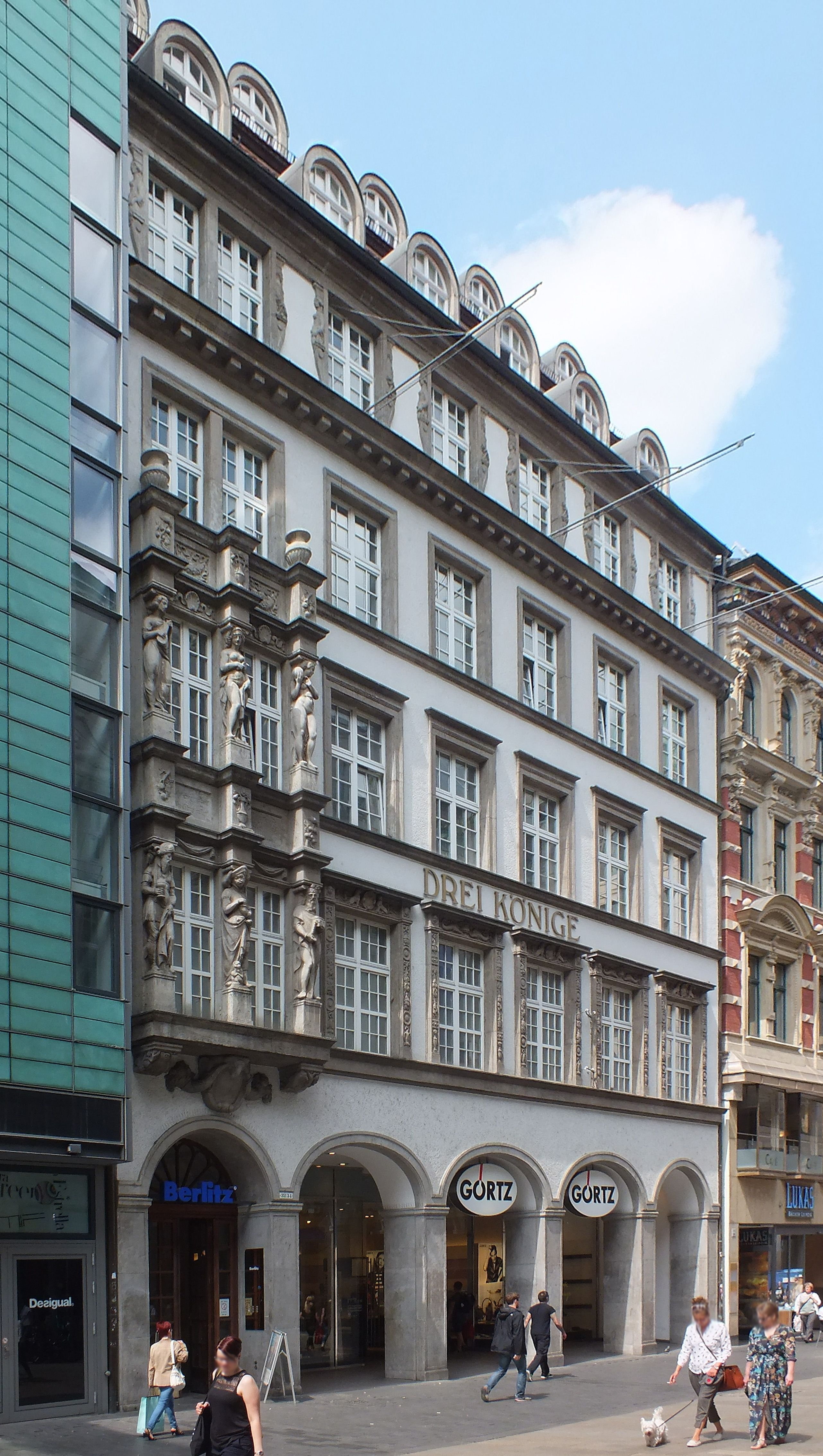 Das ehemalige Messehaus Drei Könige in Leipzig